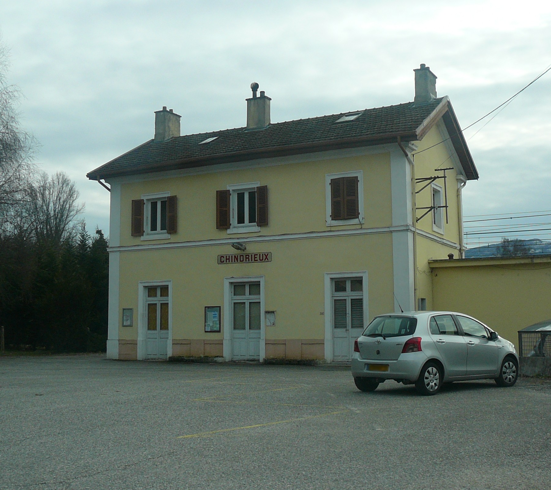 Gare de Chindrieux (Savoie)